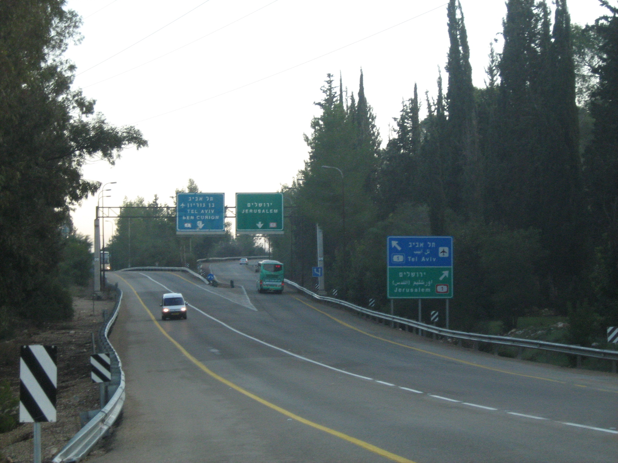 שילוט במחלף שער הגיא מכיוון כביש 38